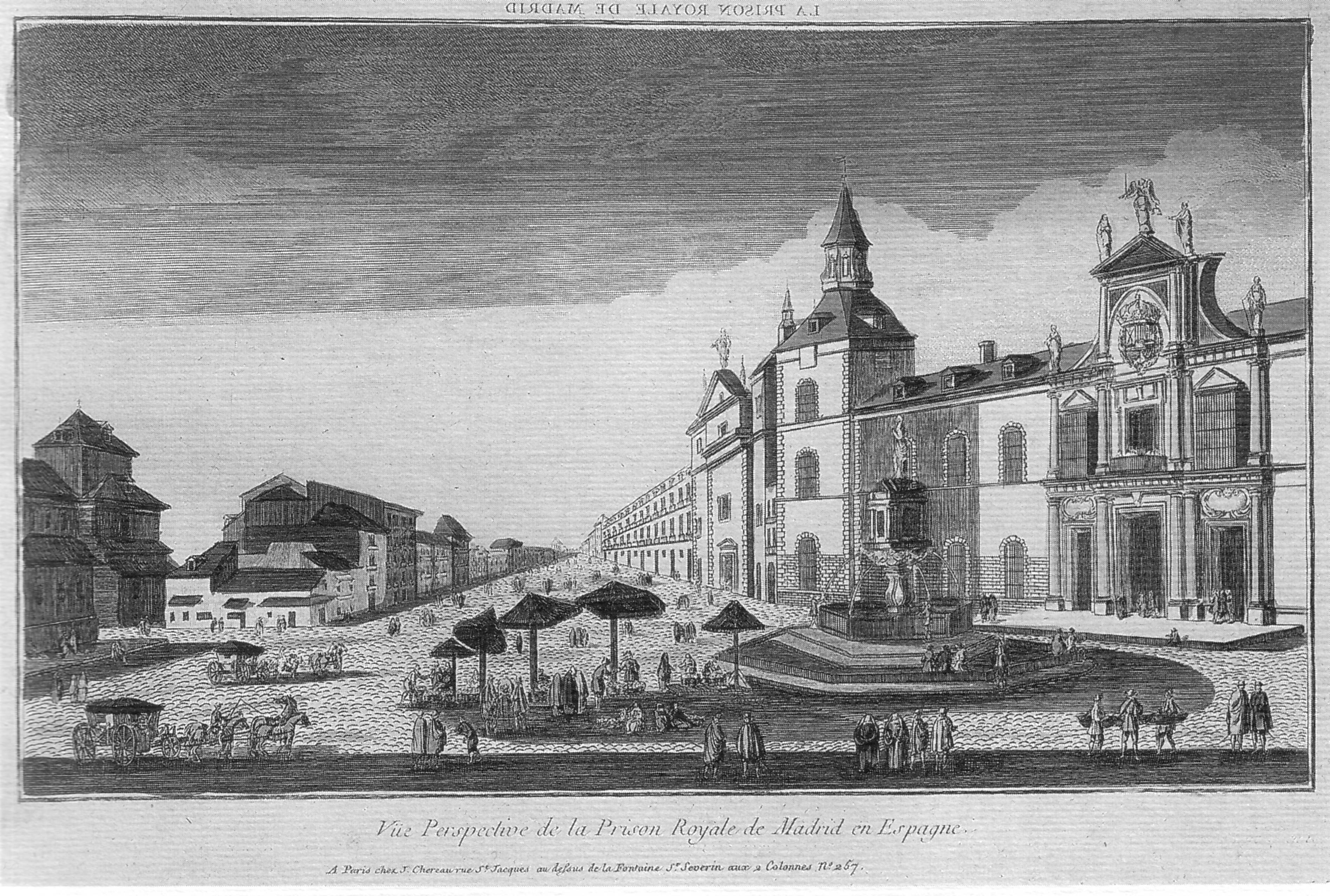 Vista de la Plaza de Santa Cruz de Madrid, la Cárcel de Corte y la fuente de Orfeo de Rutilo Gaci; al fondo se extiende la calle de Atocha. Copia de 267c405 mm., a partir del original del siglo XVII de Louis Meunier. Grabador anónimo francés. Modelos de edición de Basset y Huquier, en París.